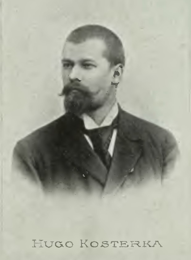 Portrét – Hugo Kosterka (1867-1956), Český překladatel a vydavatel.